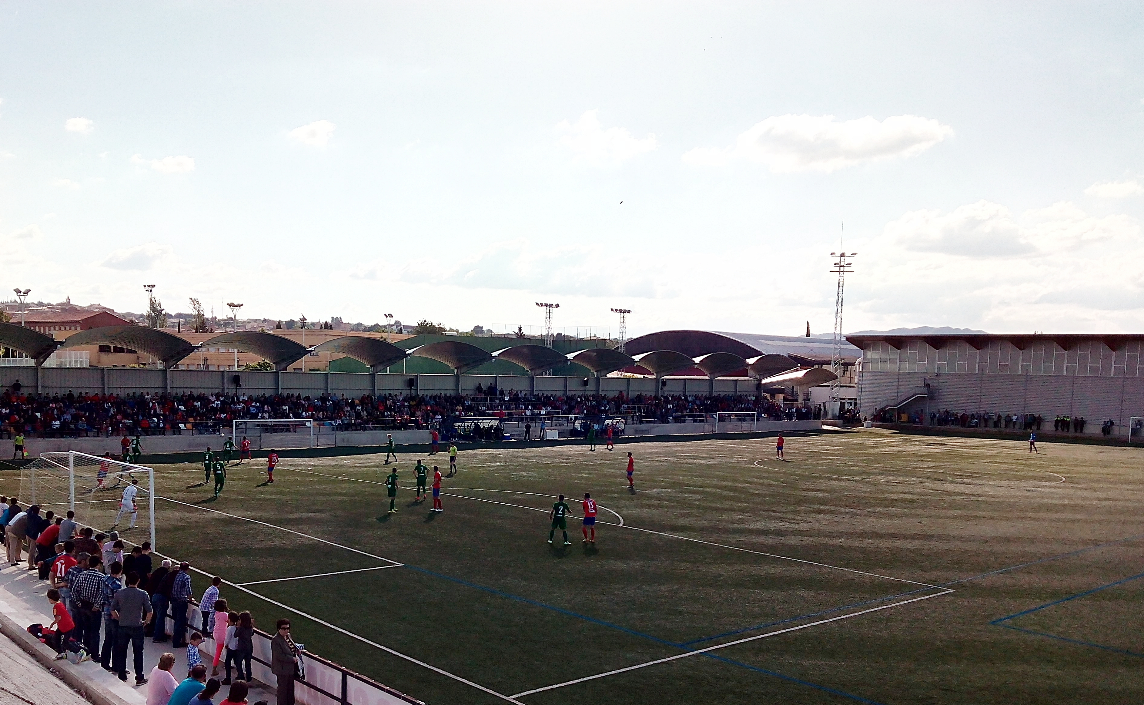 Momento del partido diputado en Tarazona de ascenso a 2ª B